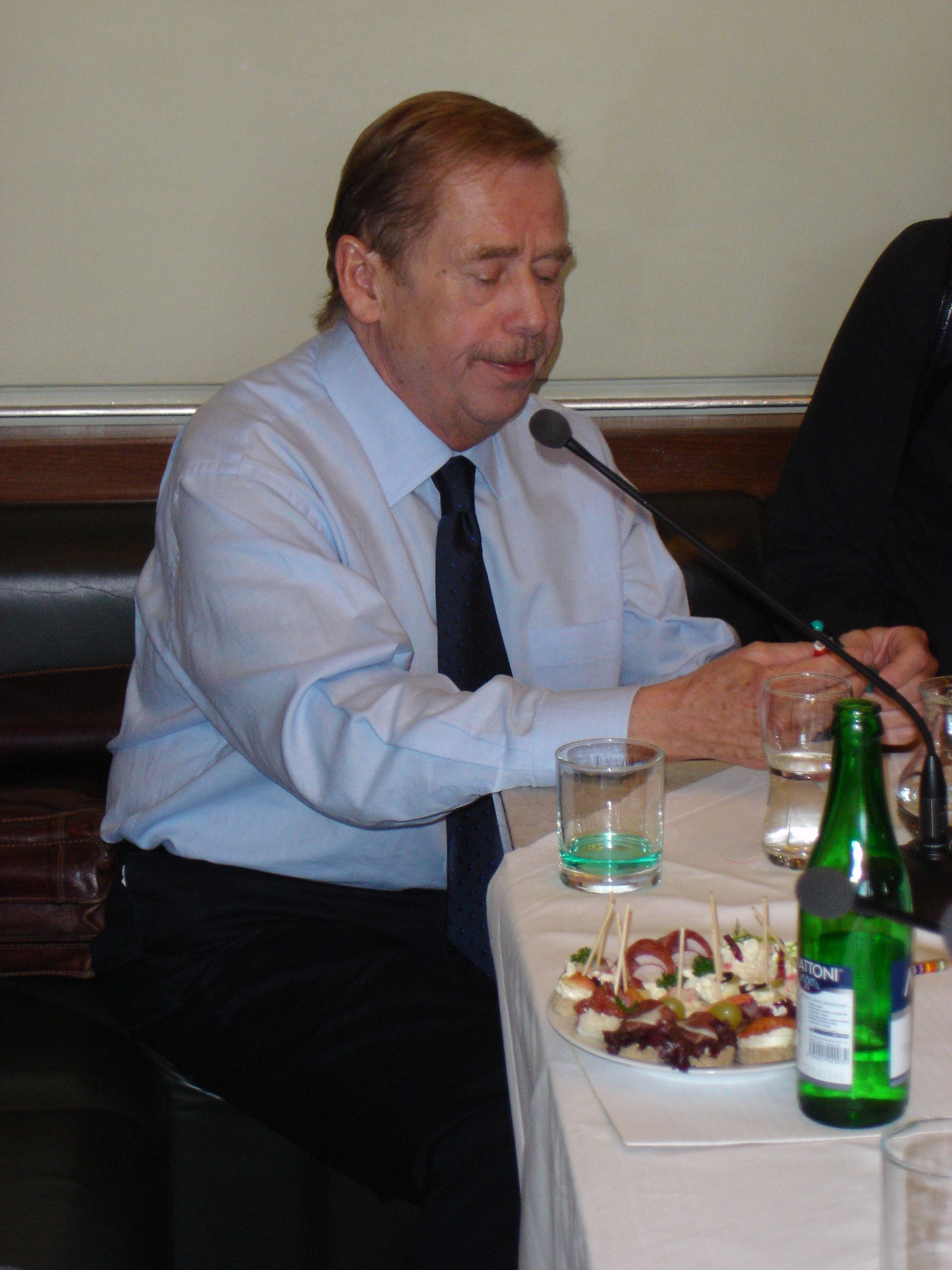 Václav Havel, 9. června 2006 v kavárně Slavia na Café d'Europe